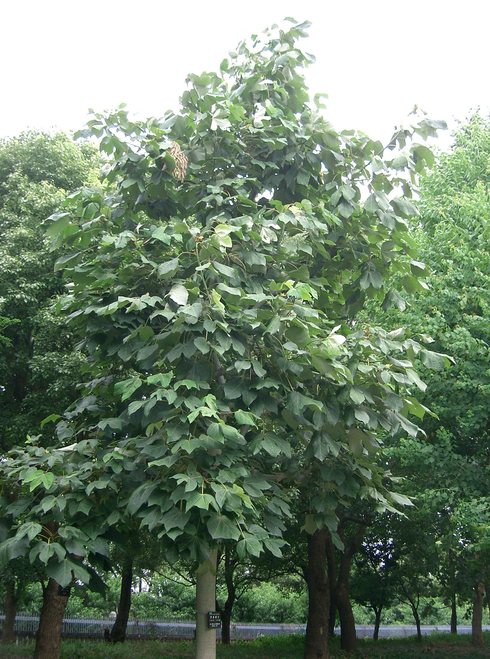 Firmiana simplex